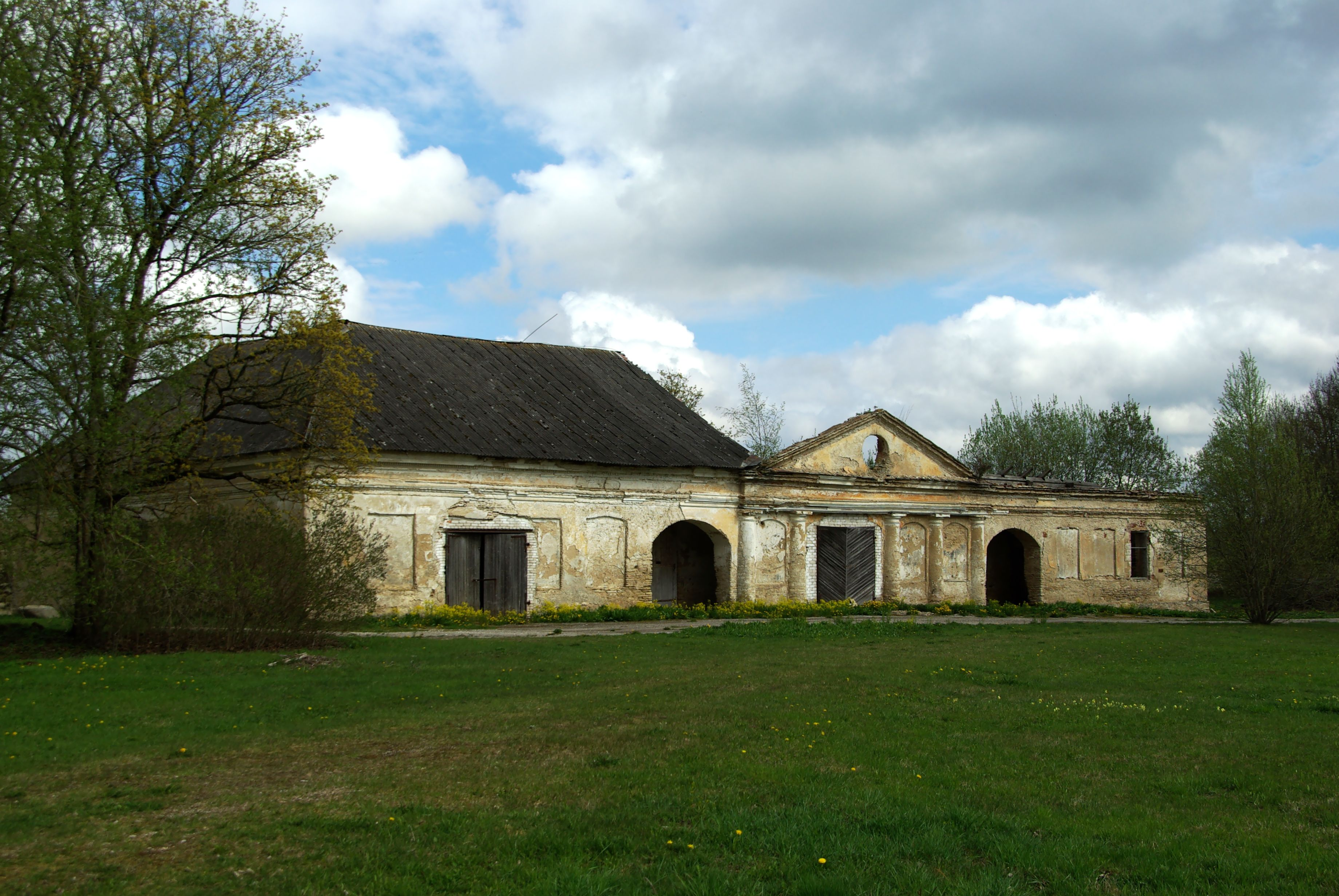 Võhmuta mõisa tõllakuur